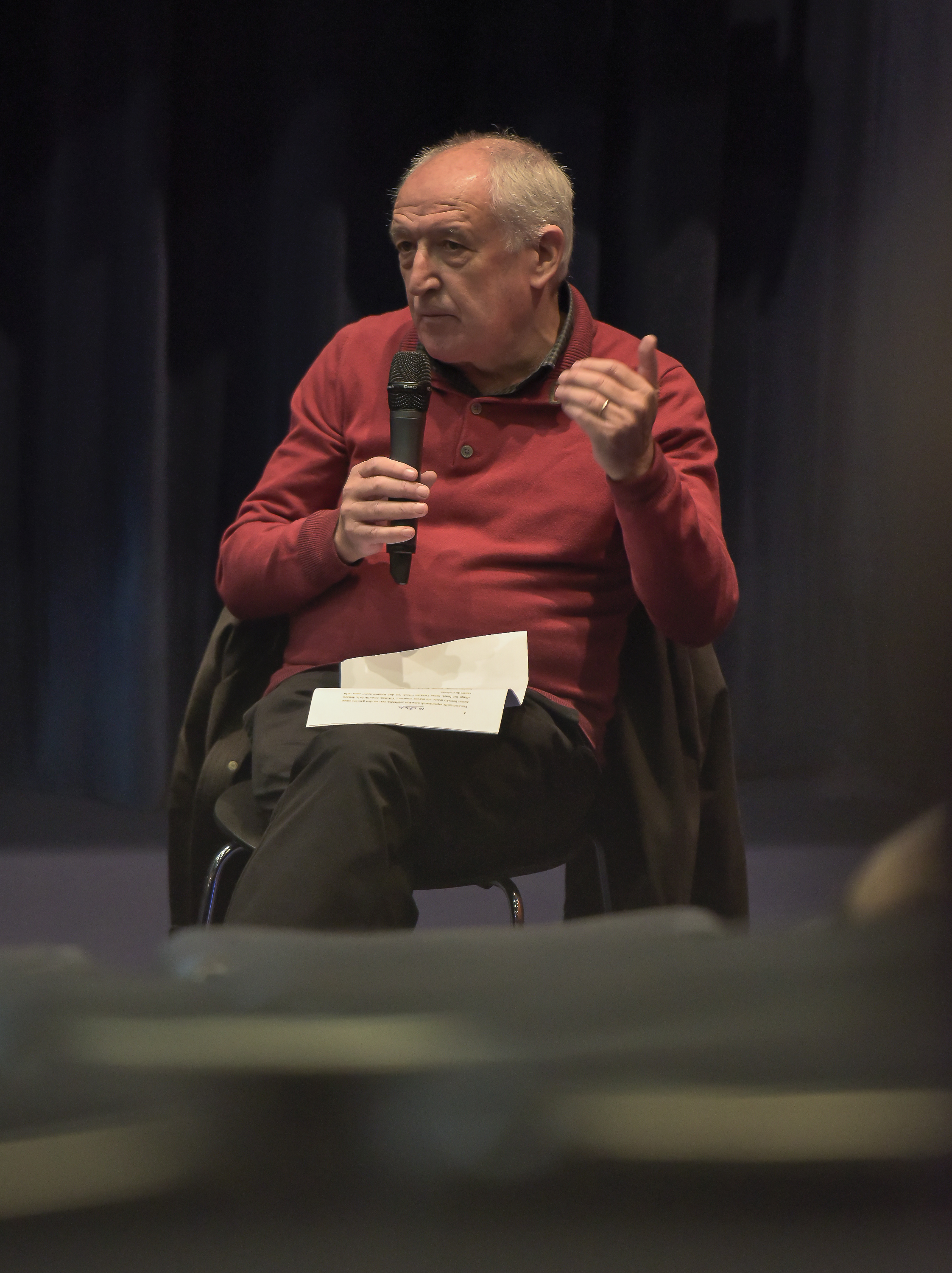 Demagun ehun urte barru II (11)